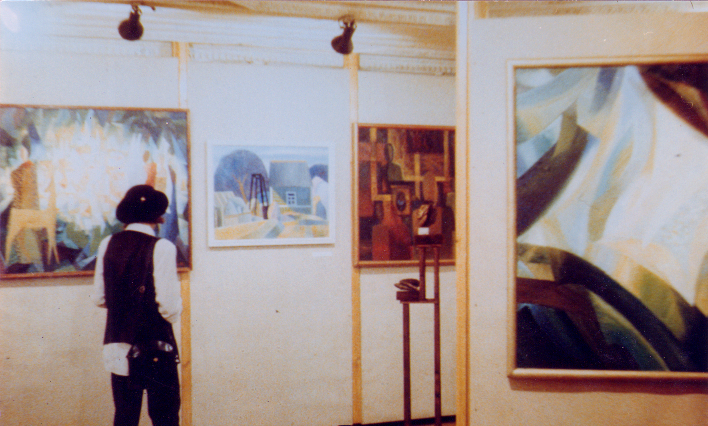 Фрагмент экспозиции выставки в Джаз Клубе на Загородном проспекте. 2-й этаж. Живопись, Графика, Скульптура Ан. Корольчук, Ал. Парыгин, Ар. Аветисян. Санкт-Петербург. 8 октября — 8 ноября 1994.